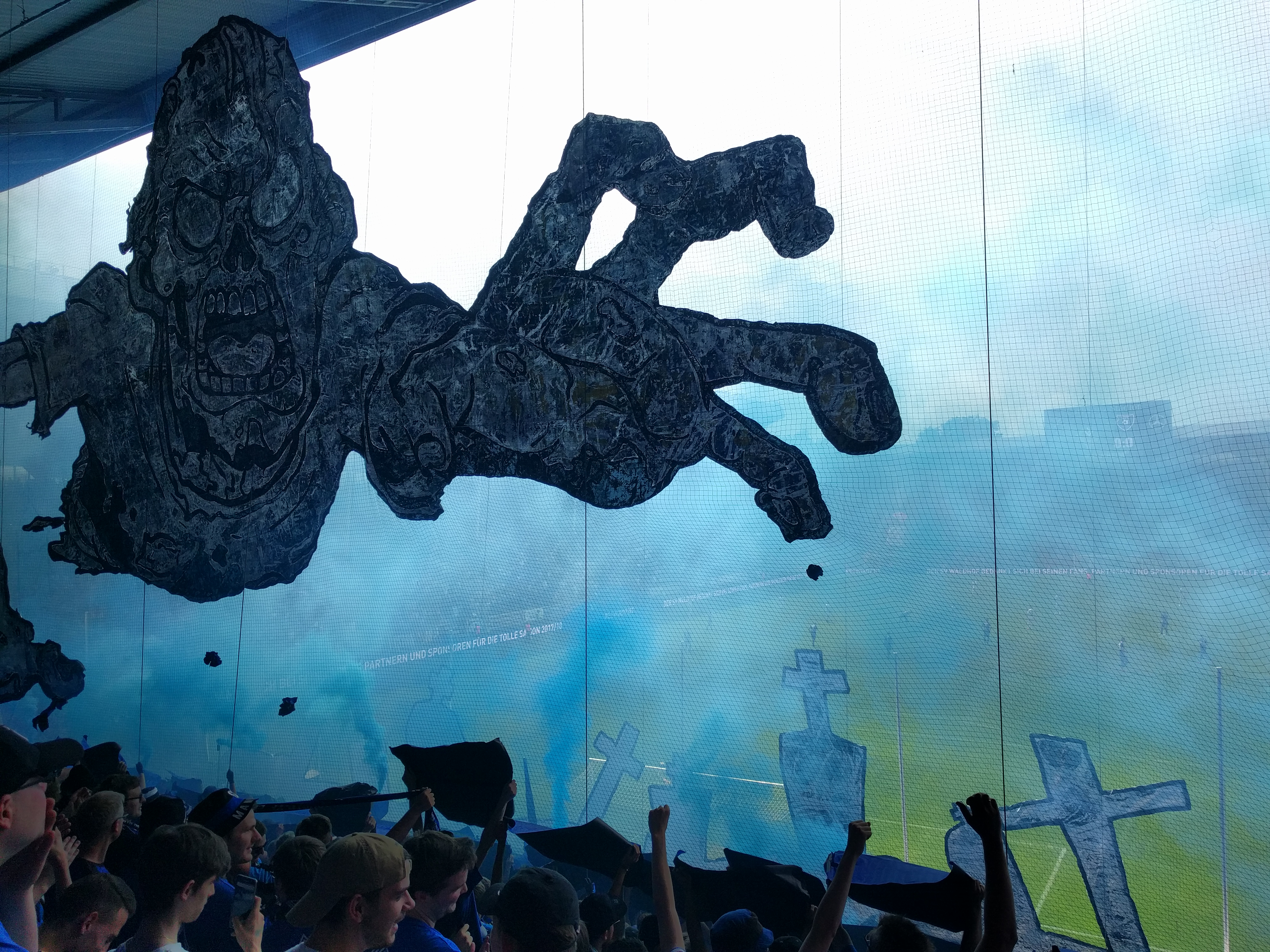 Choreographie der „Ultras Mannheim 1999“ vor dem Aufstiegsspiel des SV Waldhof Mannheim 07 gegen KFC Uerdingen 05 in die 3. Fußball-Liga am 27. Mai 2018